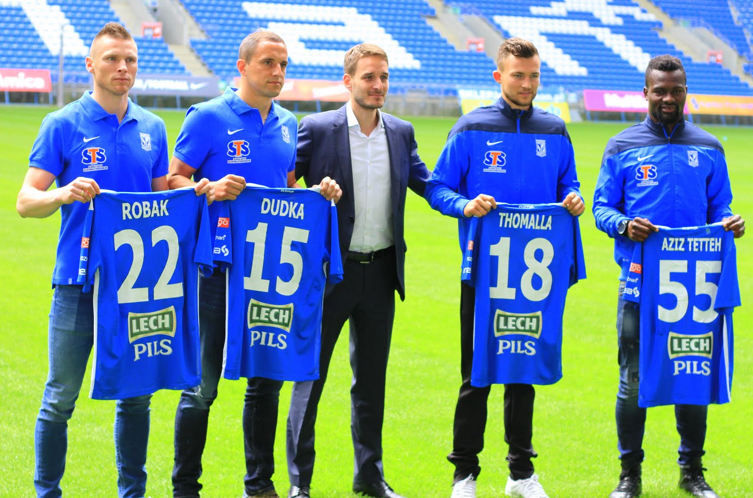 Nowi gracze pozyskani przez zespół Lech Poznań w czerwcu 2015: Robak, Dudka, Thomalla, Aziz Tetteh